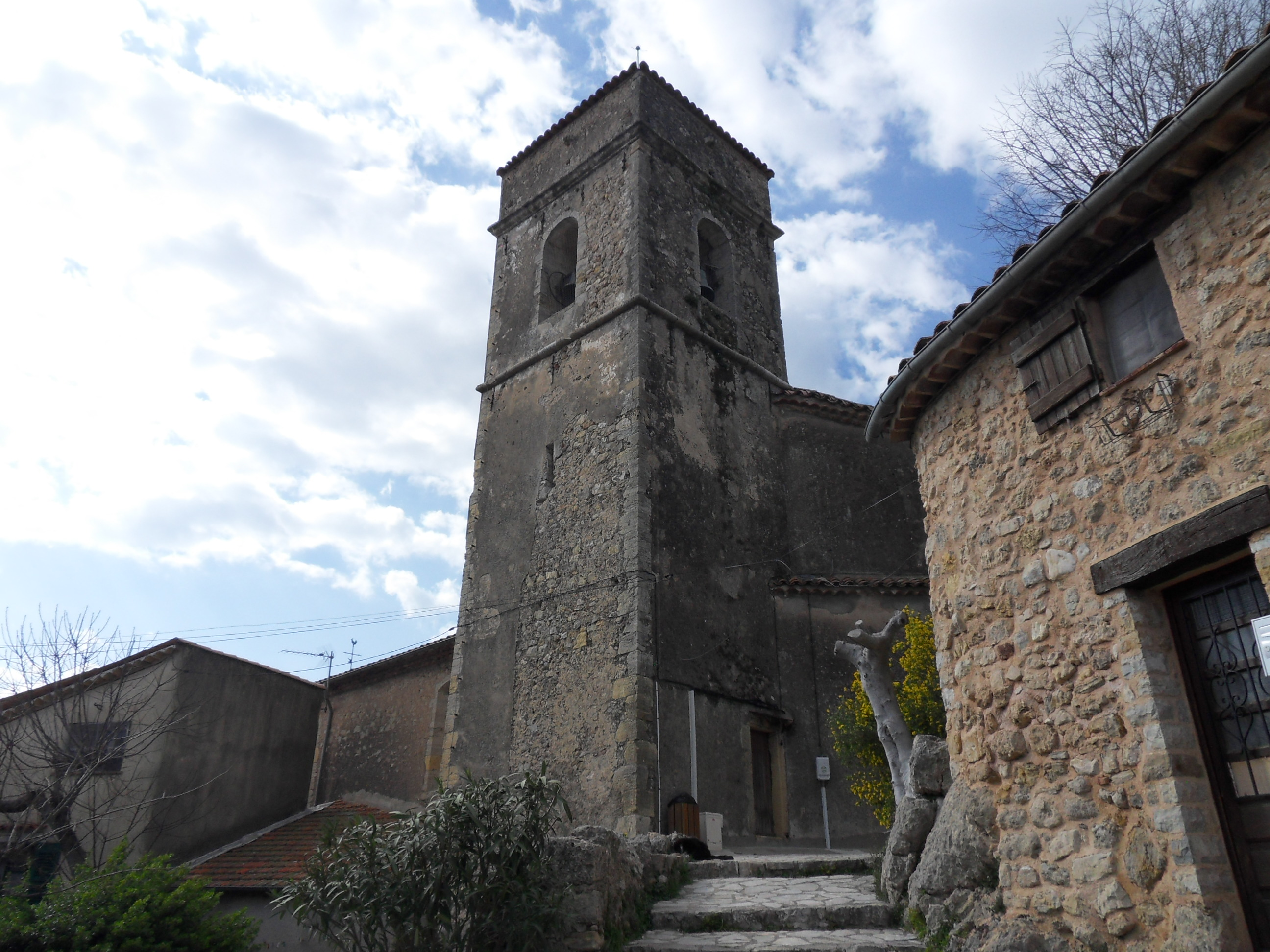 Montauroux (Clocher de l'église Saint-Barthélémy)